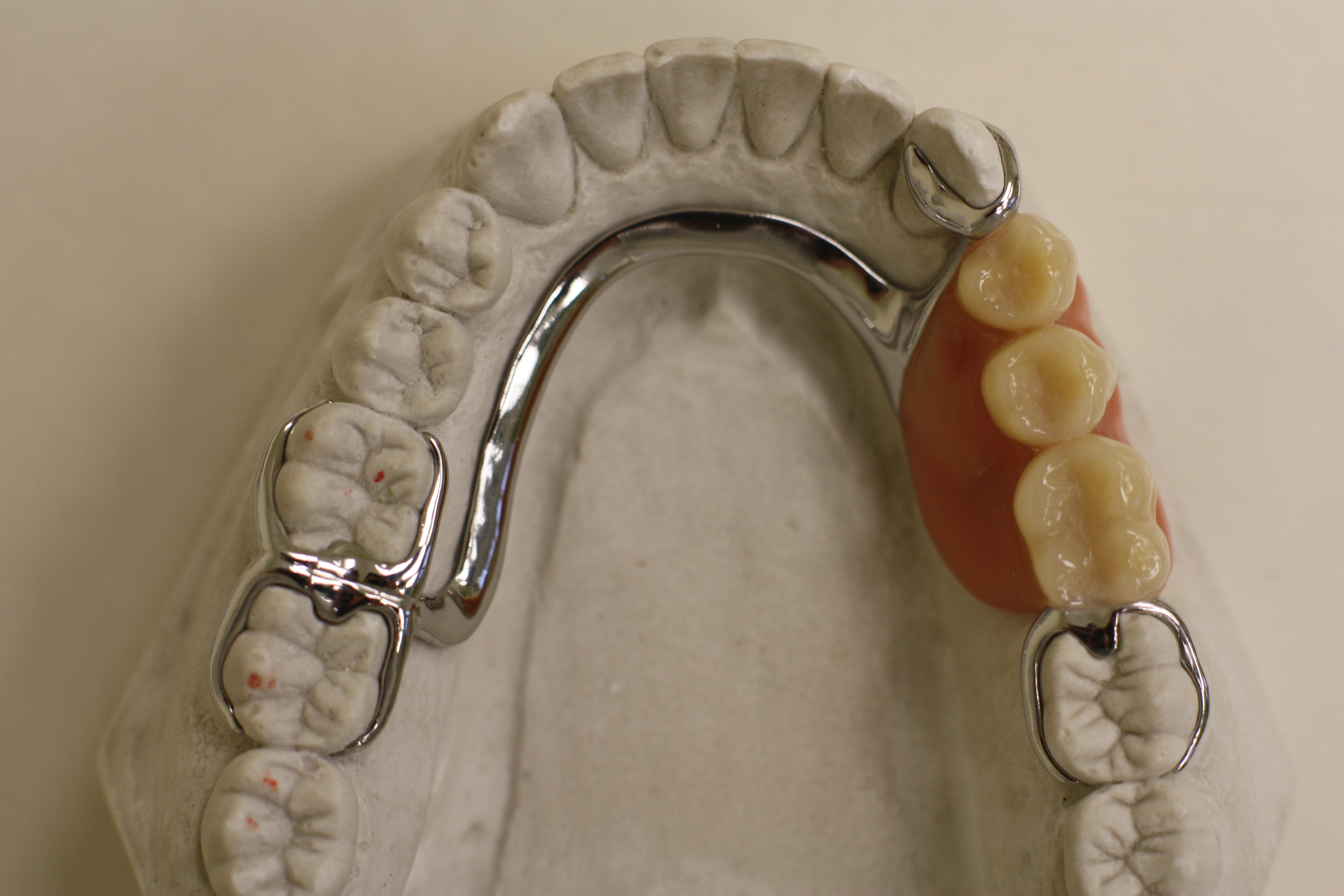 Teilprothese, Modellguss, Modellgussprothese